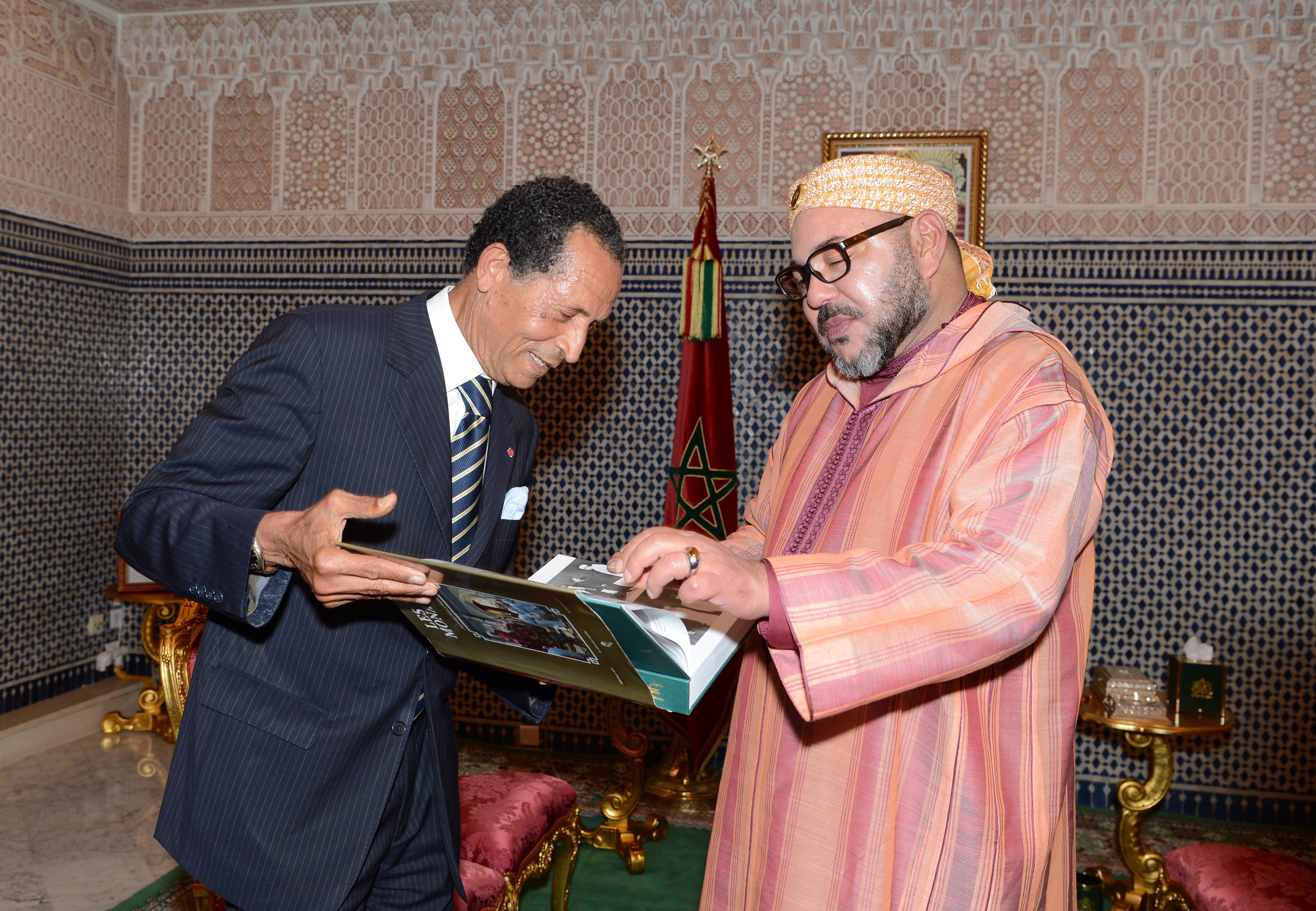 Le 7 Novembre 2016 à Dakar: S.M. Le Roi Mohamed VI reçoit l'artiste-photographe Mohamed Maradji qui a présenté au souverain son nouveau livre intitulé "Les trois Monarques, l'histoire par la photographie"